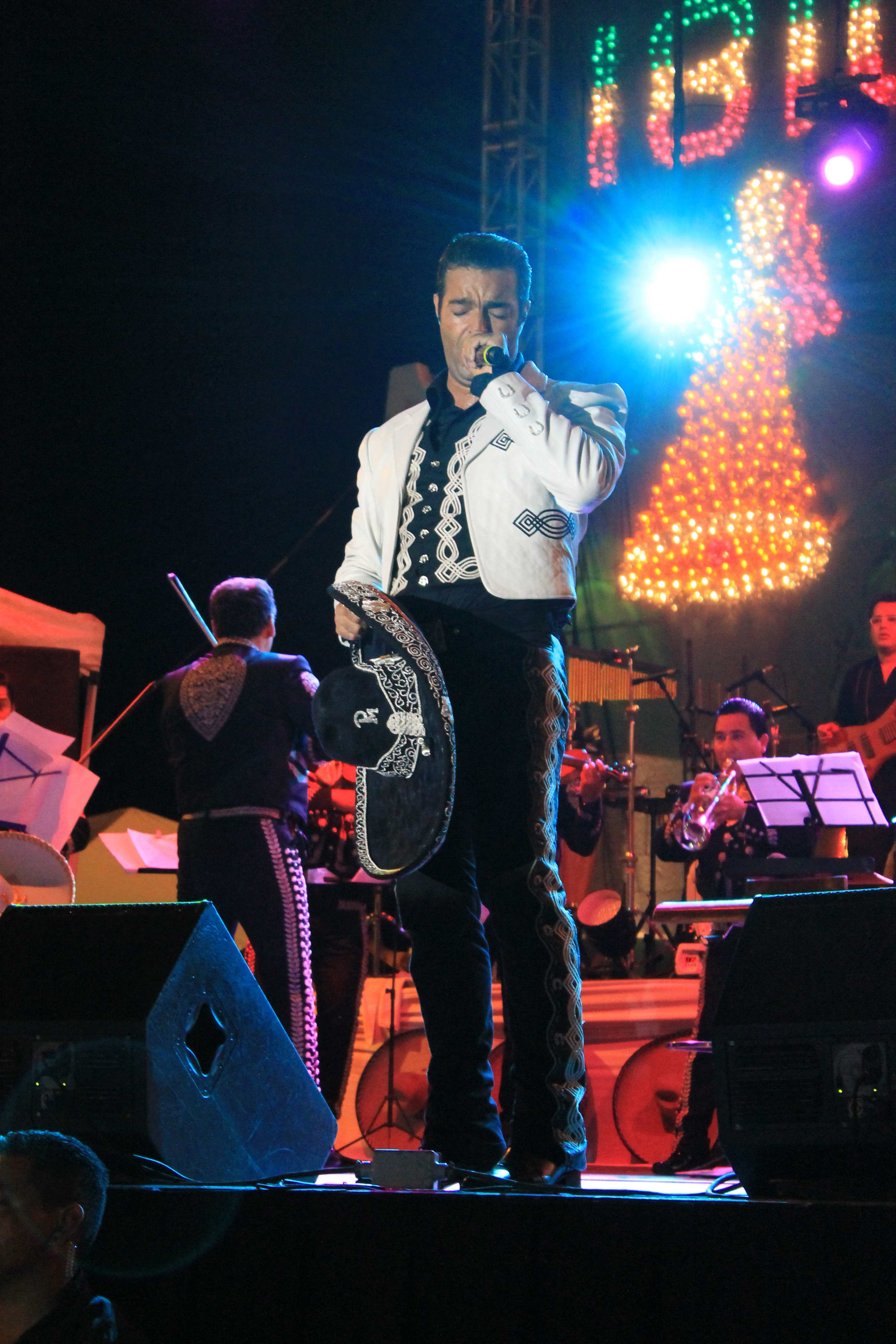 Pablo Montero El 16 De Septiembre En Las Celebraciones Patrias De Cancun Quintana Roo Plaza de la Reforma